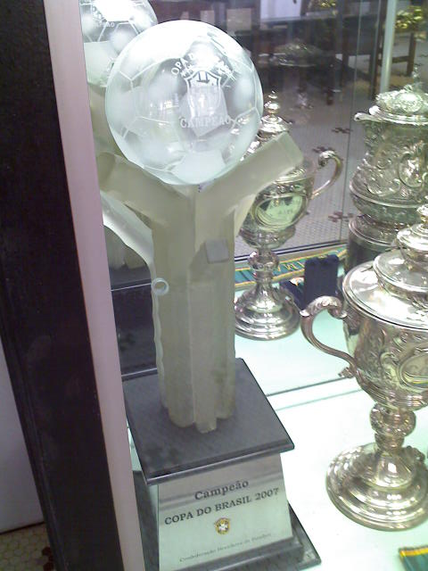 Taça da Copa do Brasil de 2007 conquistada pelo Fluminense.